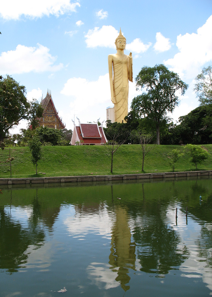 Phra Phuttha Rattana Mongkhon Maha Muni or Luang Pho Yai, Wat Burapha Phiram, Roi Et Province.